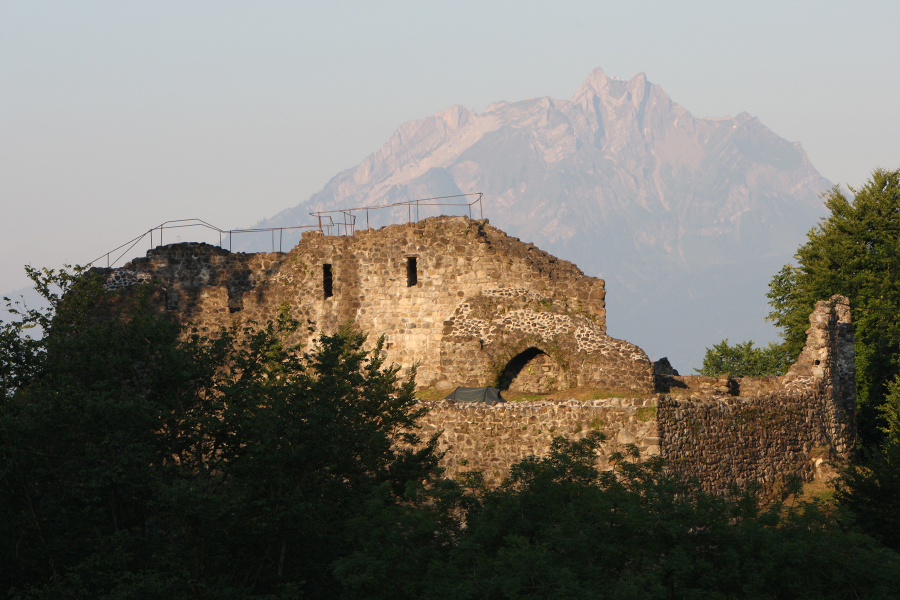 Die Ostseite der Gesslerburg ob Küssnacht, Kanton Schwyz